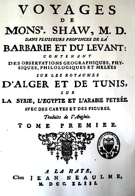 Premiere page de son livre